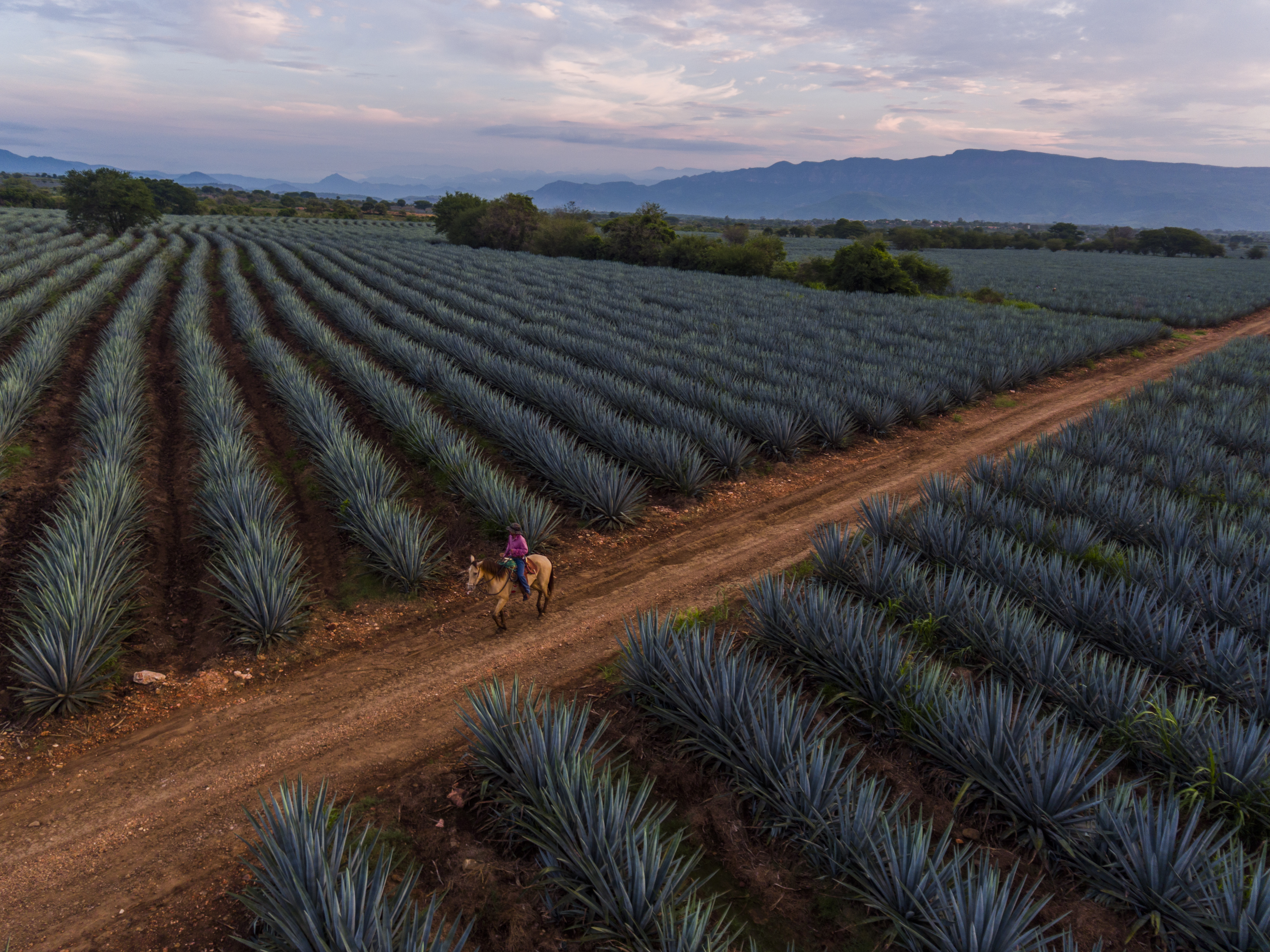 Paisaje agavero de Jose Cuervo en Tequila, Jalisco